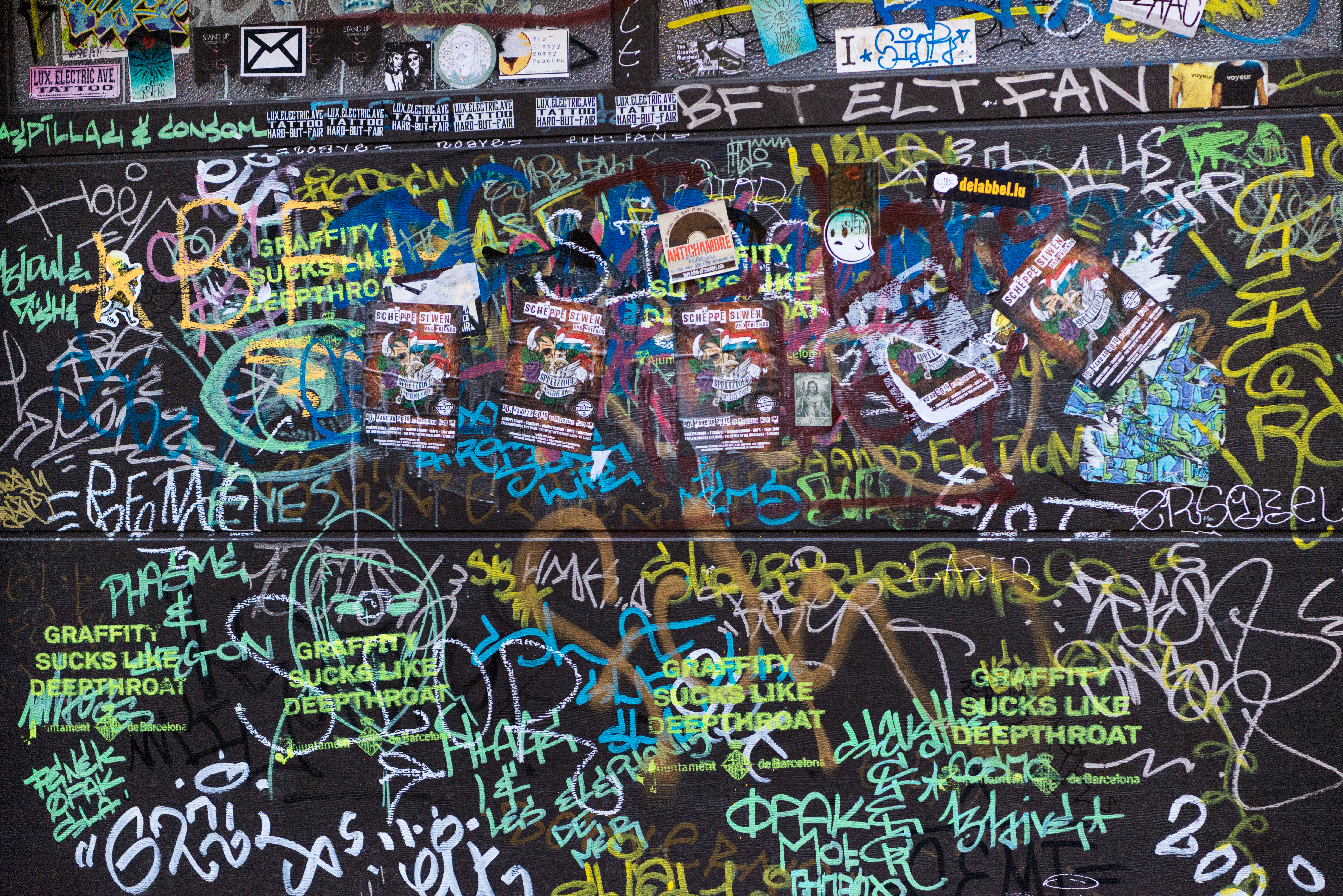 Graffiti an der Hossegässel an der Stad.